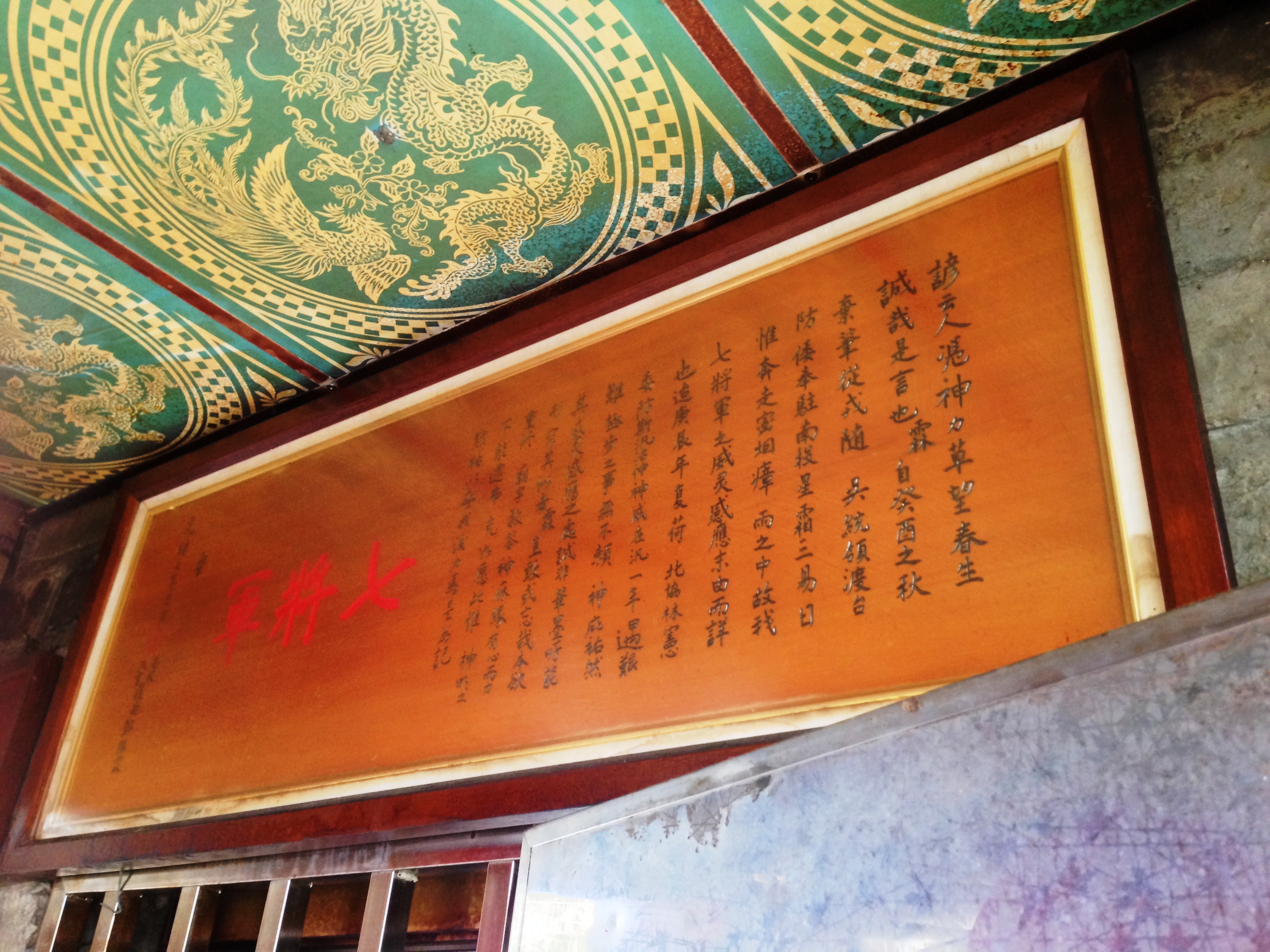 七將軍匾複製品